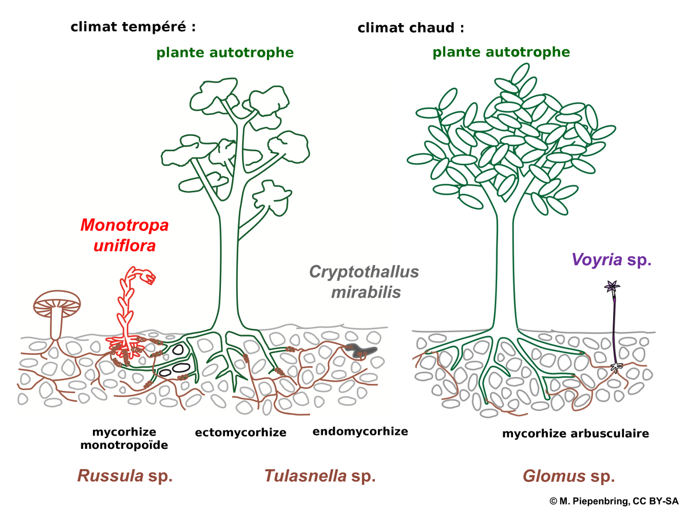 Les différents types de mycorhizes chez les mycohétérotrophes